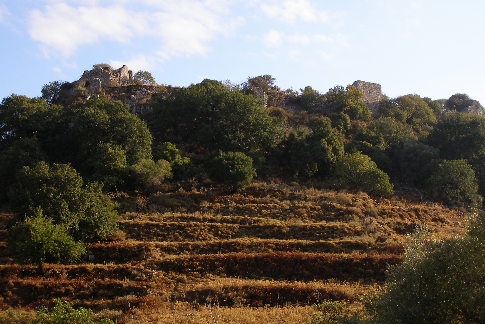 Die besteigbare Nordflanke der Festung Bonriparo (Monopari, Μονοπάρι) auf Kreta